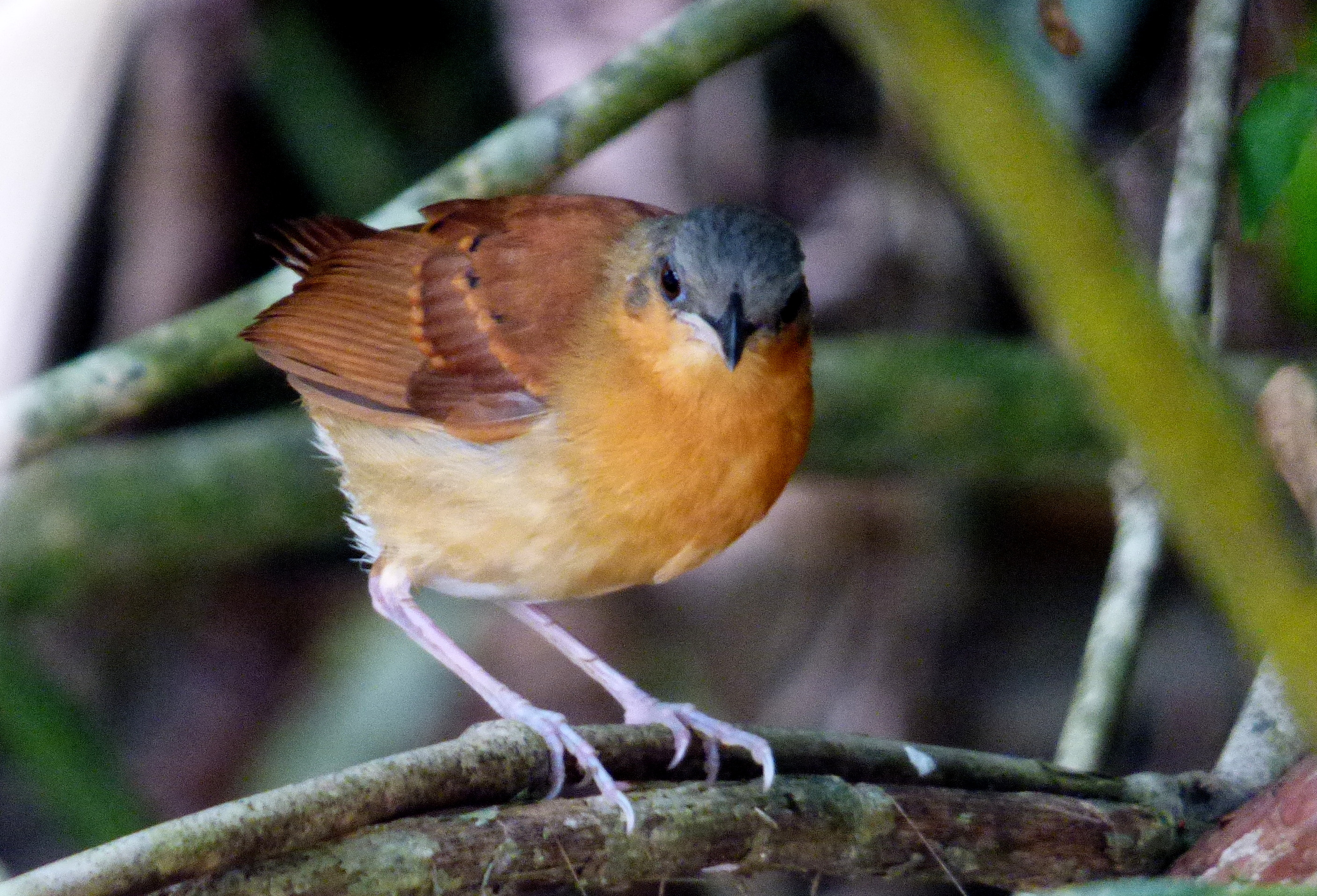 Myrmeciza longipes (Hormiguero pechiblanco) - Hembra (2)